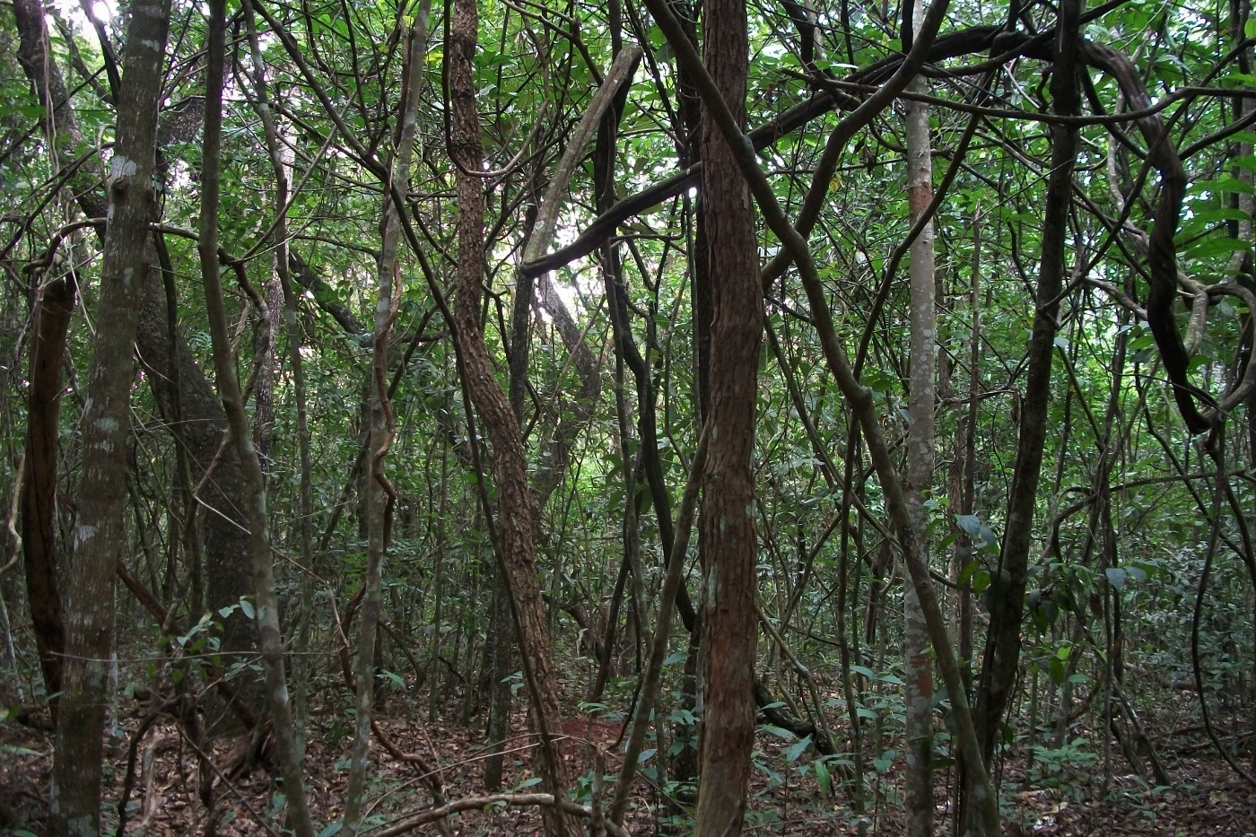 Vegetação adentro - Parque Estadual Matas do Segredo, Campo Grande-MS